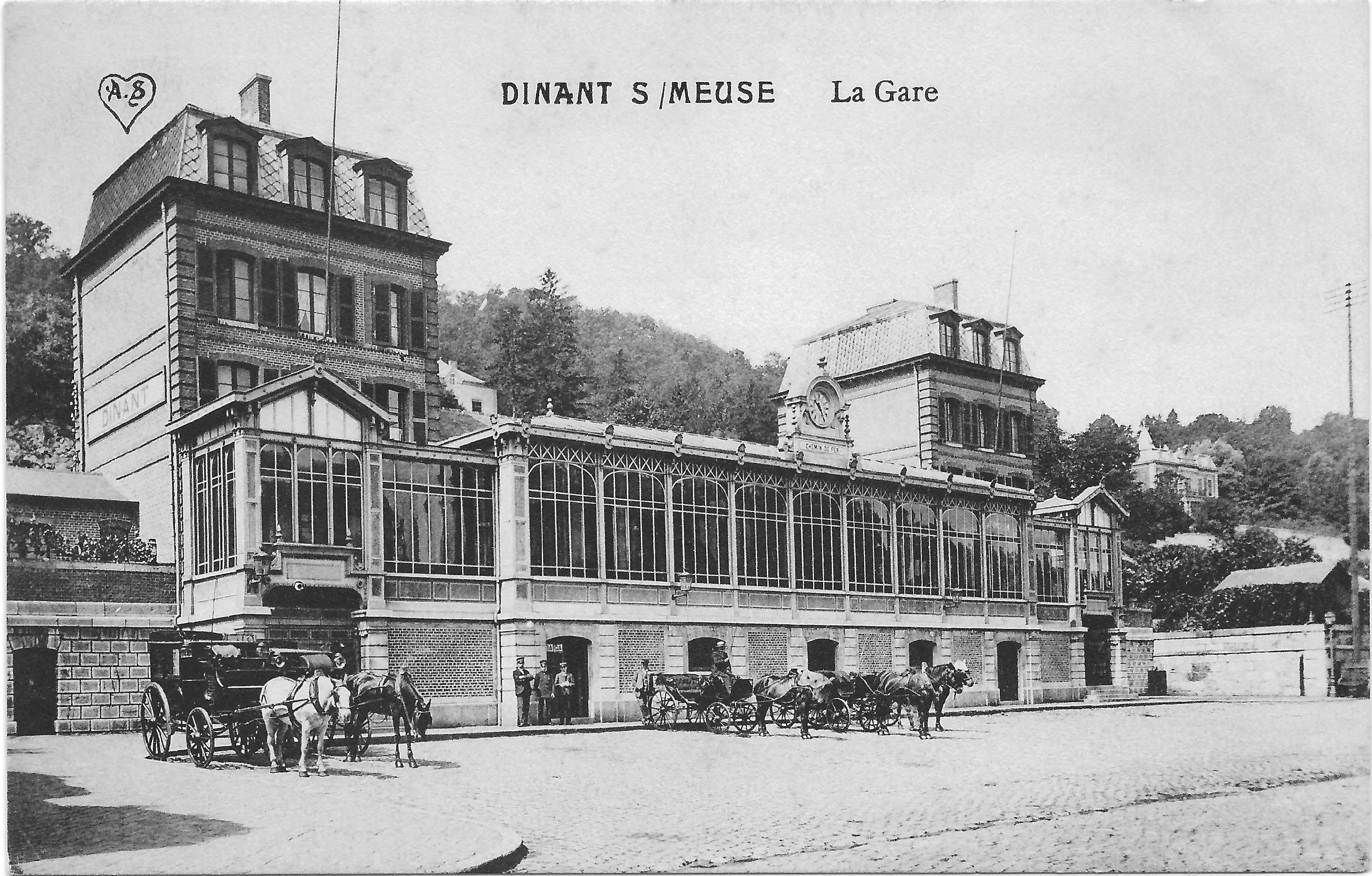 Station Dinant in de paardentijd